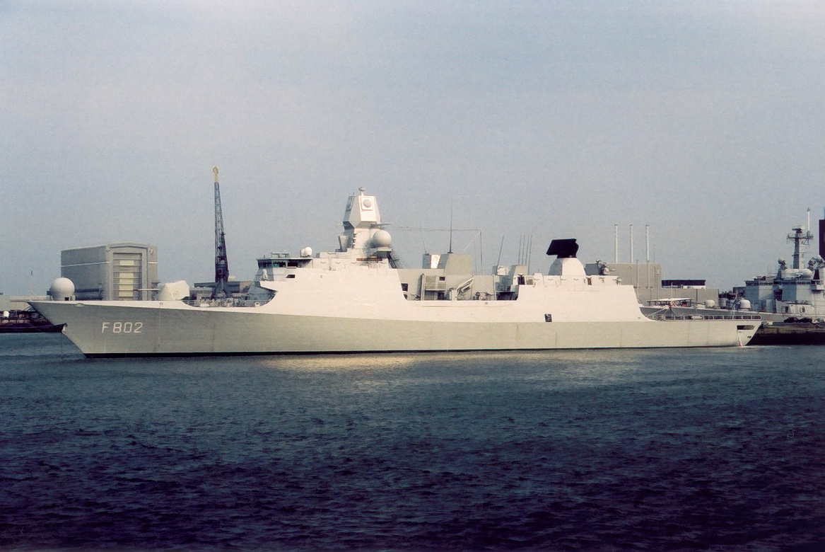 Hr. Ms. De Zeven Provinciën aan de kade in Den Helder (2003). Categorie:Afbeelding schip